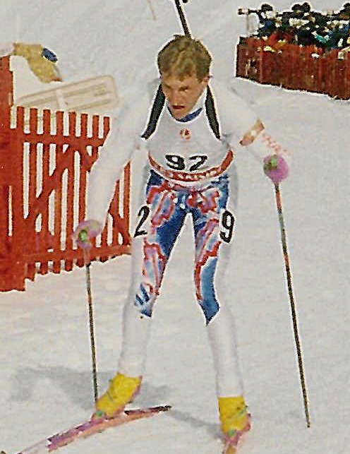 Patrice Bailly-Salins lors du 10 km hommes des J.O. d'Alberville, le 12 février 1992.